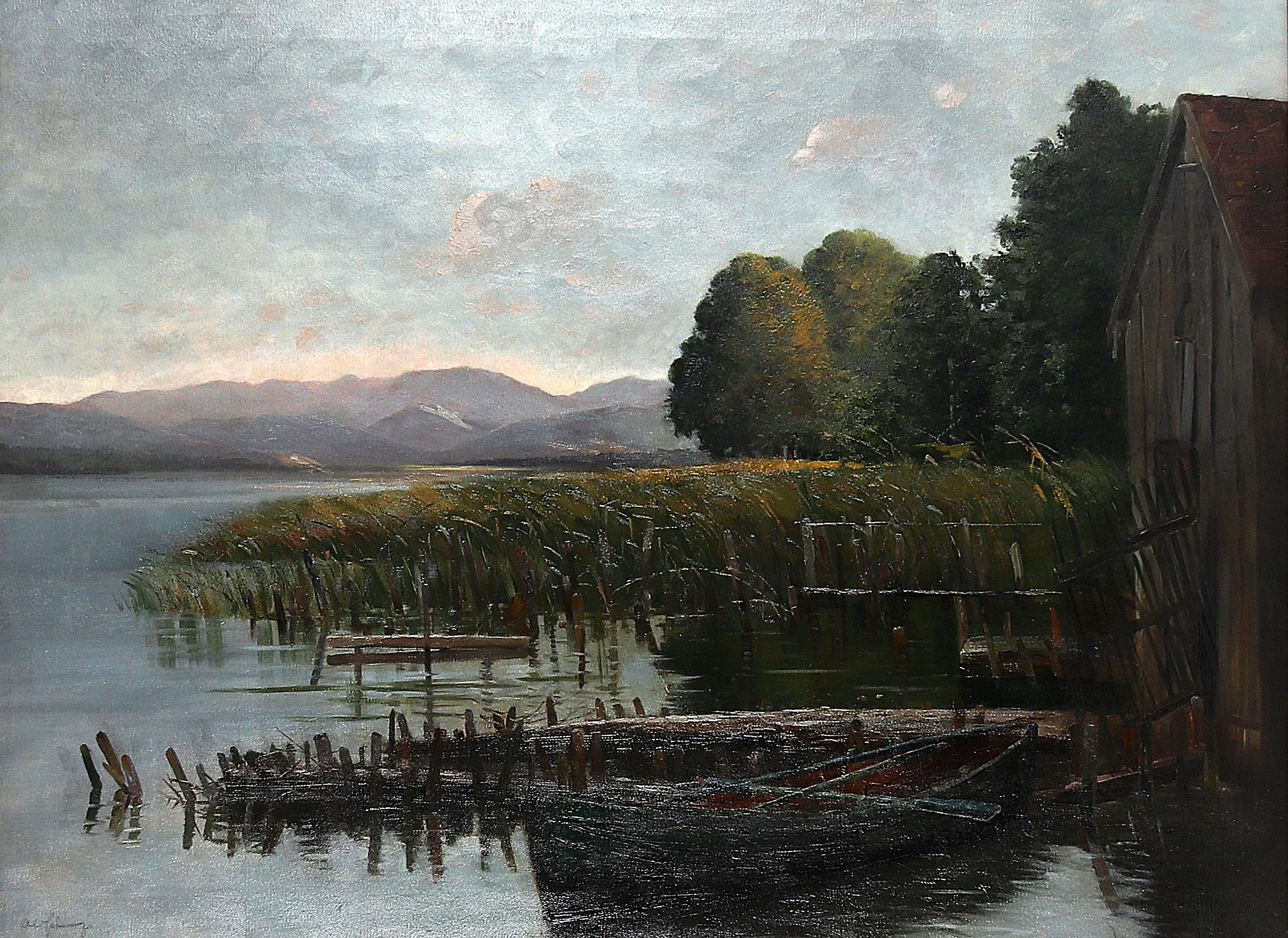 Am Wörthersee, signiert Ad. Schwarz, Öl auf Leinwand, 73 x 100 cm